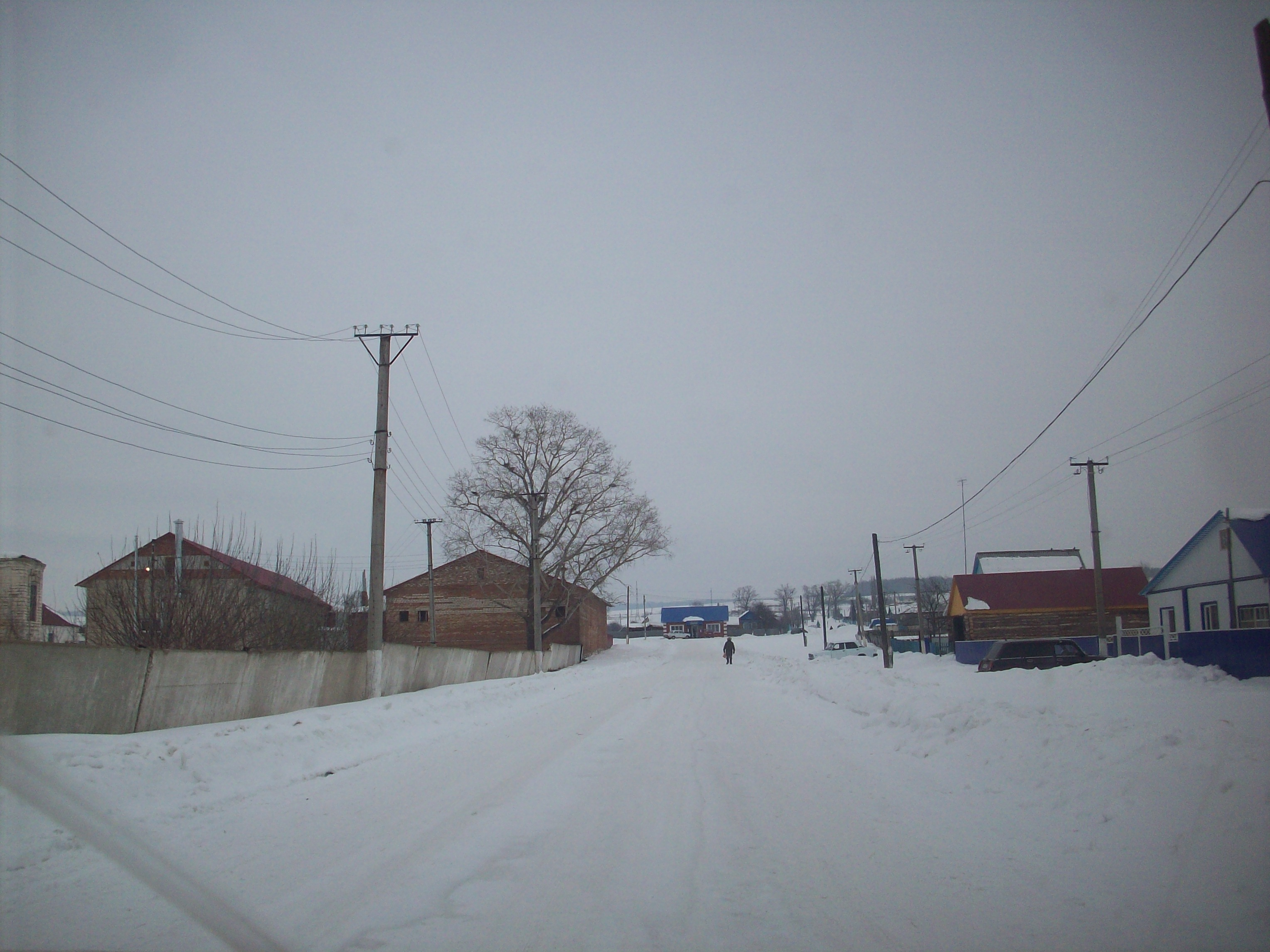 Слак